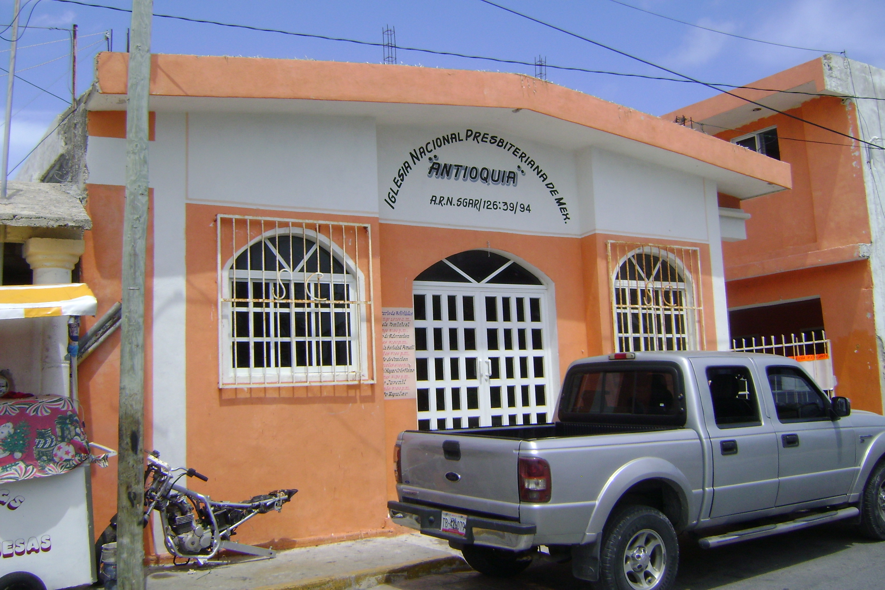 Iglesia Nacional Presbiteriana de México Antioquía, Av. Punta Arenas x Boca Limbo y Calle sin nombre, Isla Mujeres, Quintana Roo.